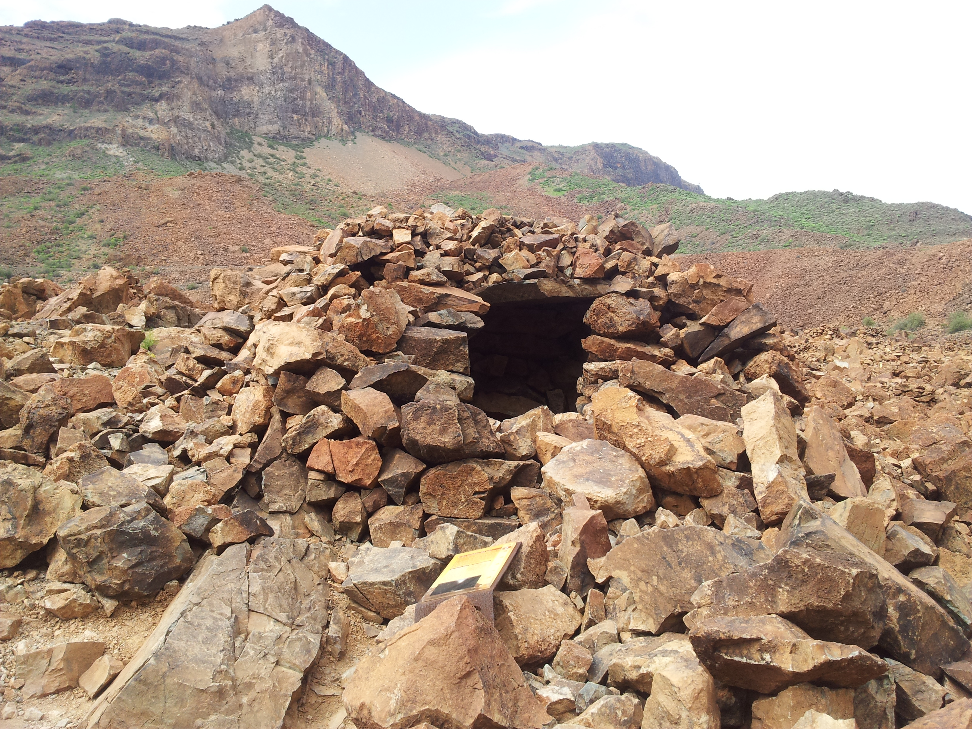 Estructura tumular realizada sobre el depósito funerario.